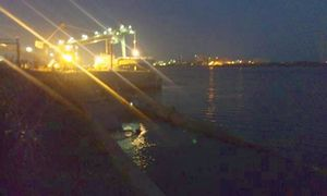 東日本大震災により崩落した鹿島港アンモニア埠頭